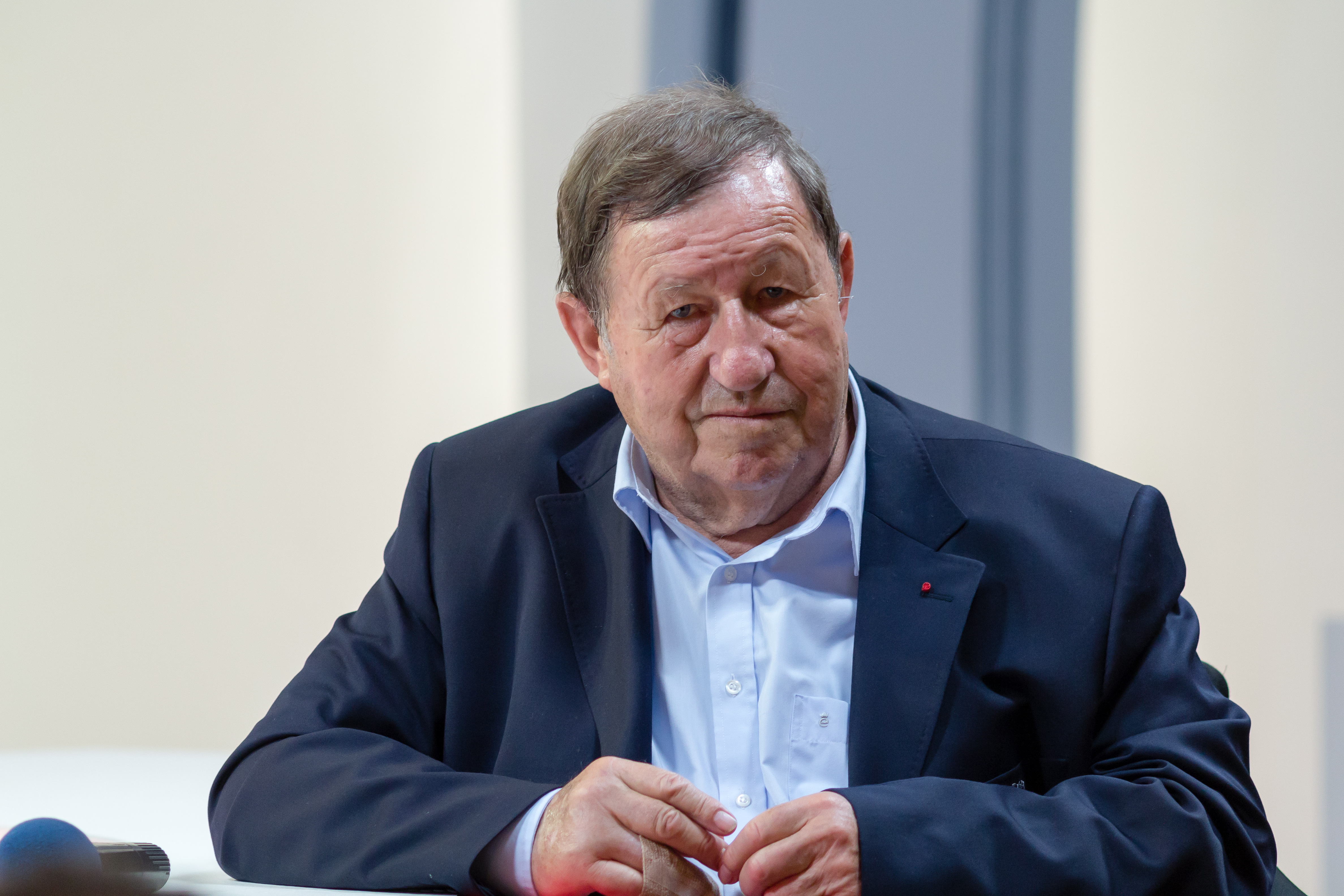 Guy Roux en conférence à l'espace Ouest-France de Rennes le 14 mai 2014 pour la présentation de son livre « il n'y a pas que le foot dans la vie. »